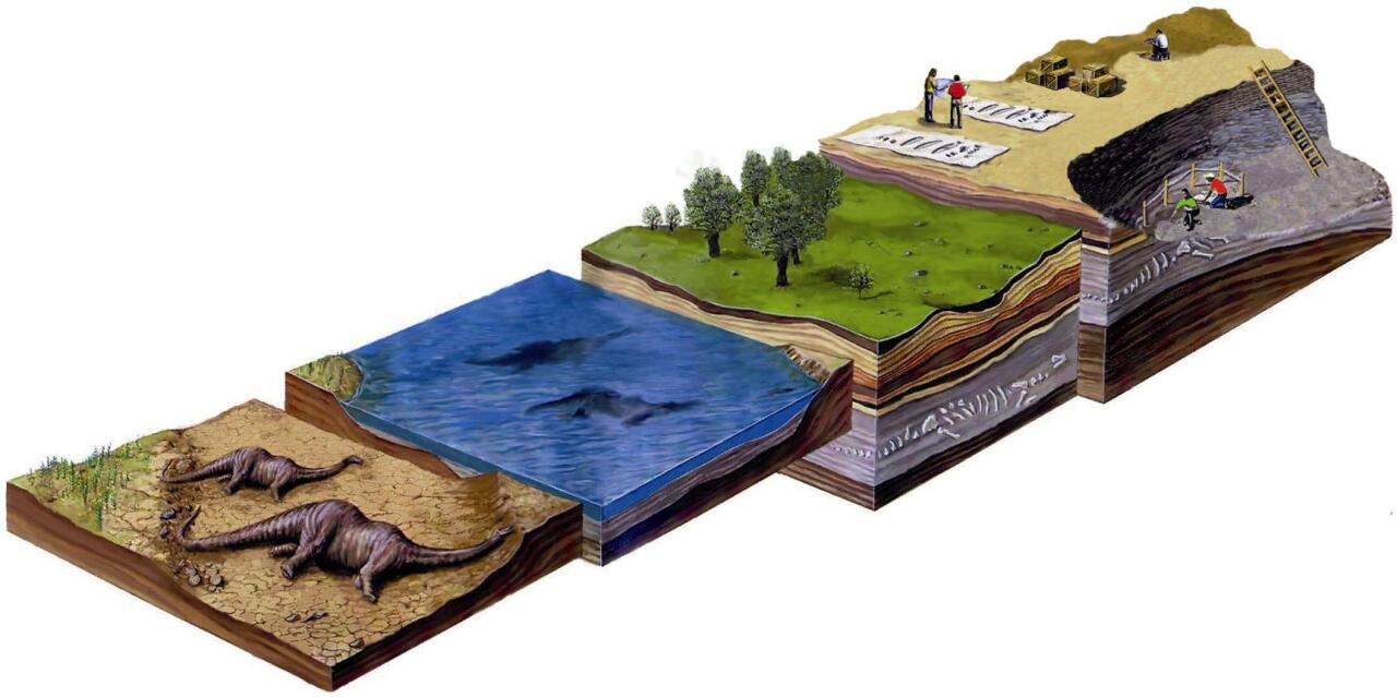 Animalia hil, lurpean geratu, fosildu eta paleontologoek aztarnategian haren fosila aurkitu eta aztertu arteko bidea